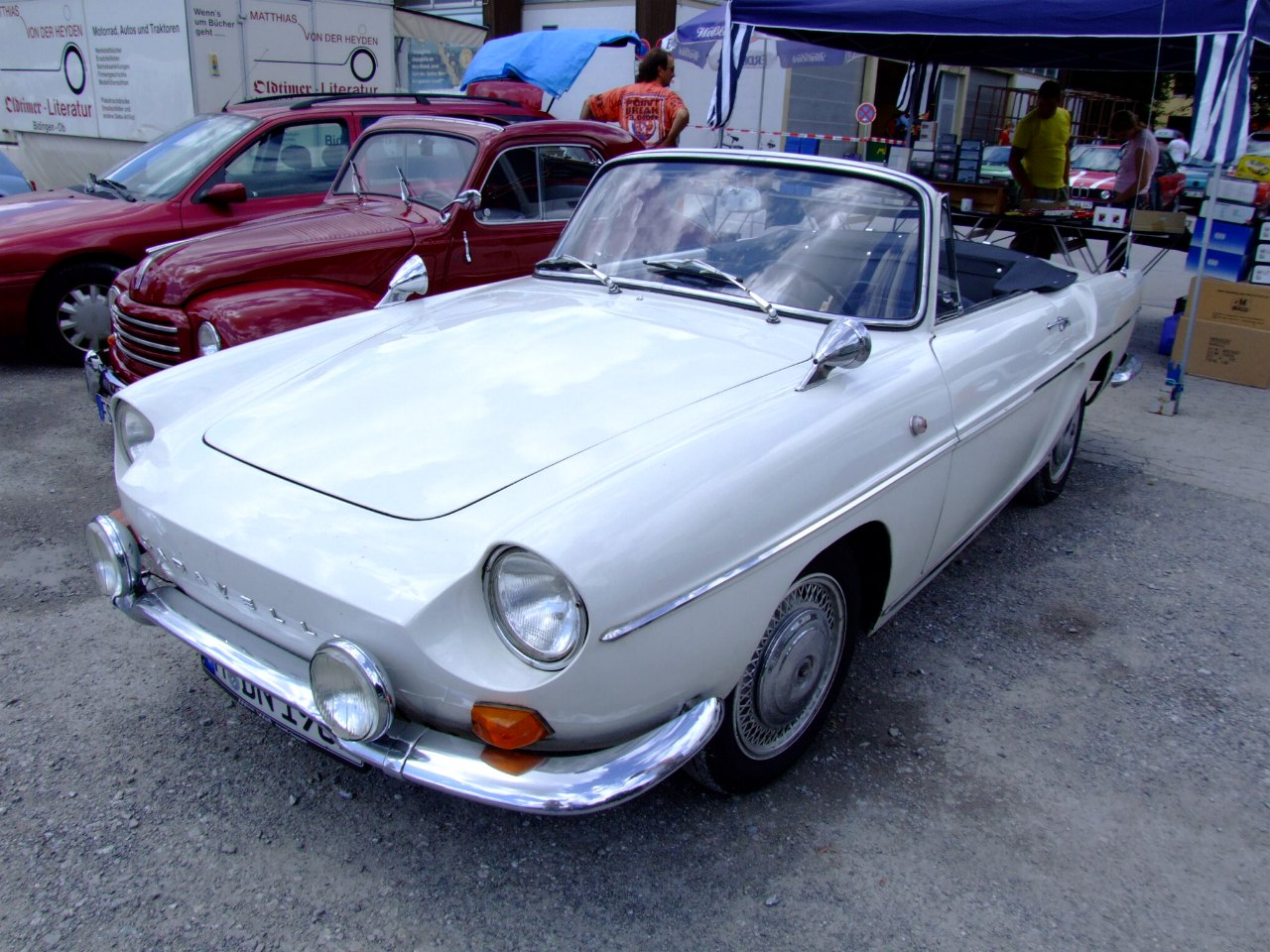 Quelle: selbst fotografiert, 07/2006 Fotograf: Späth Chr.